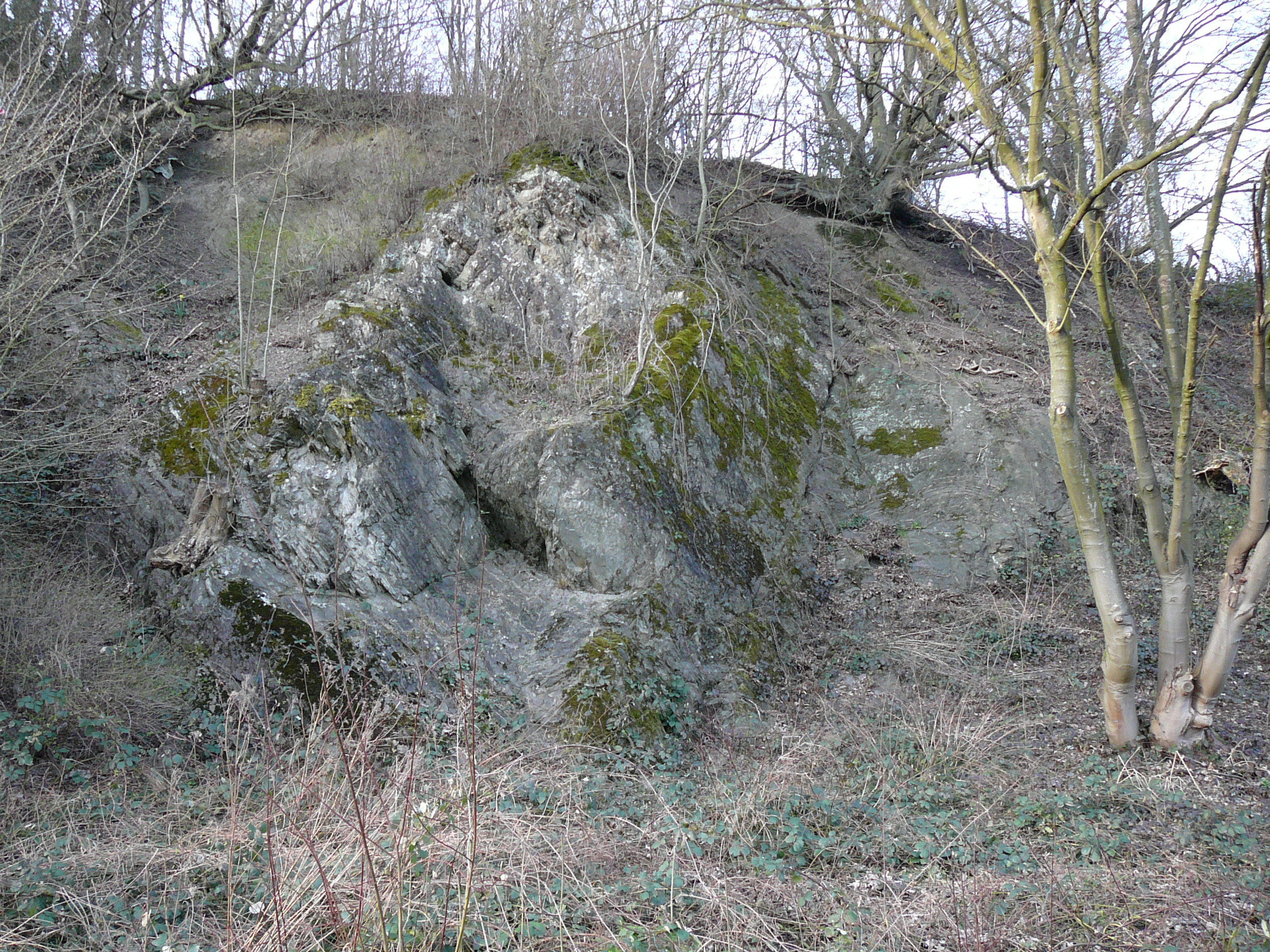 Dorrenberg